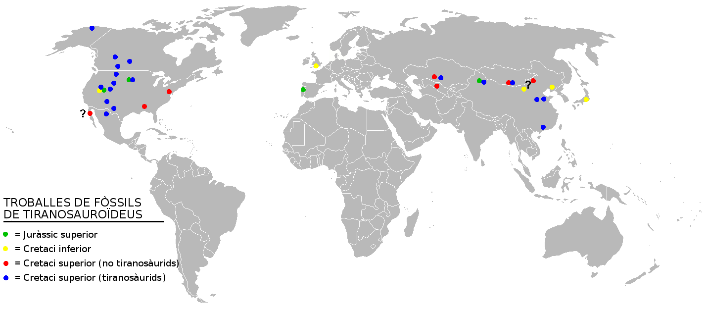 Distribució de les troballes de tiranosauroïdeus